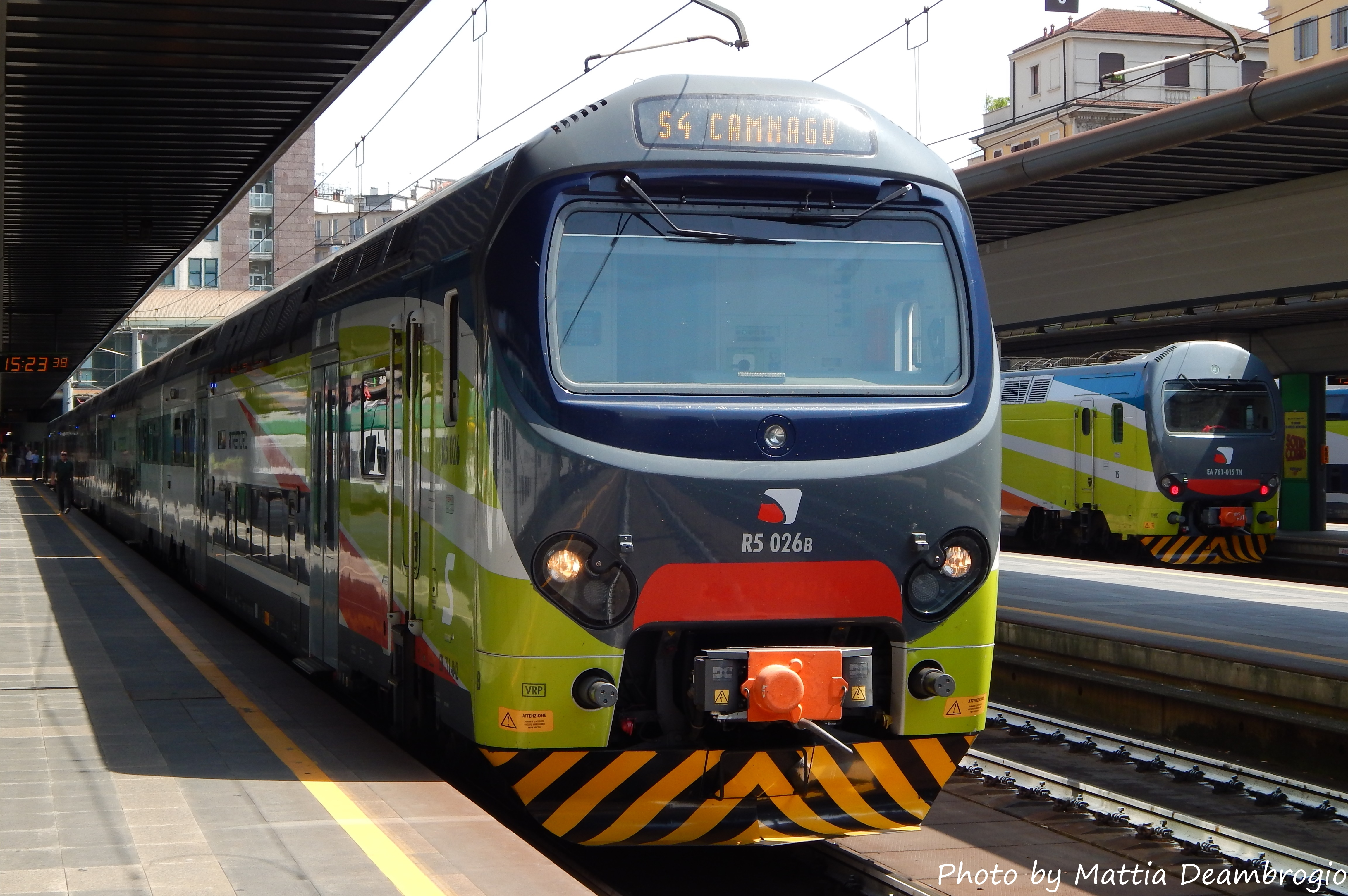 TSR R5 026 in servizio S4 in attesa di partire da Milano Cadorna. 8 Giugno 2014